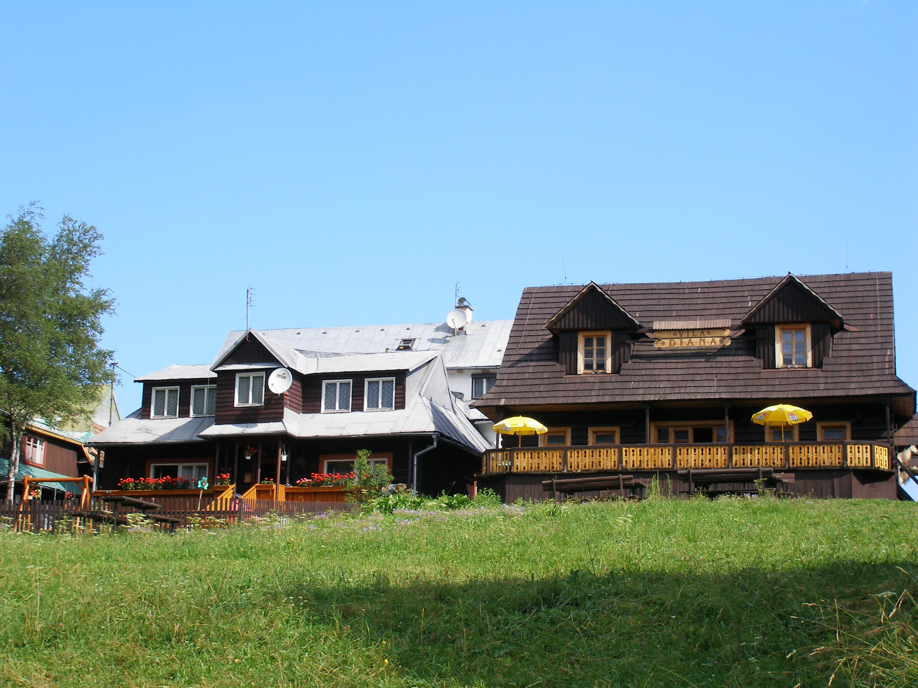 Podtatranská obec Ždiar